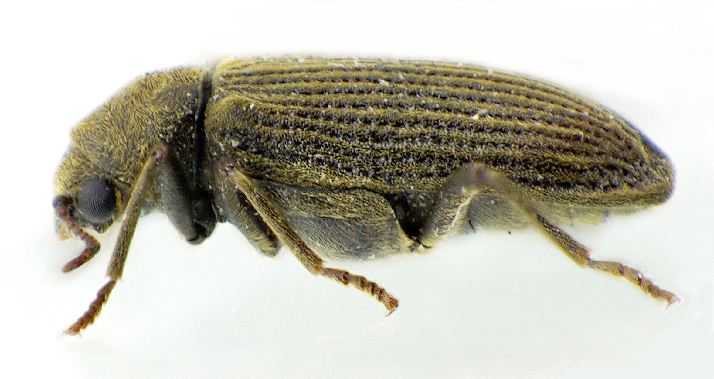 Grynobius planus aus Baden-Württemberg zwischen Rottweil und Tuttlingen, 700 m hoch, am 5. Mai 2914